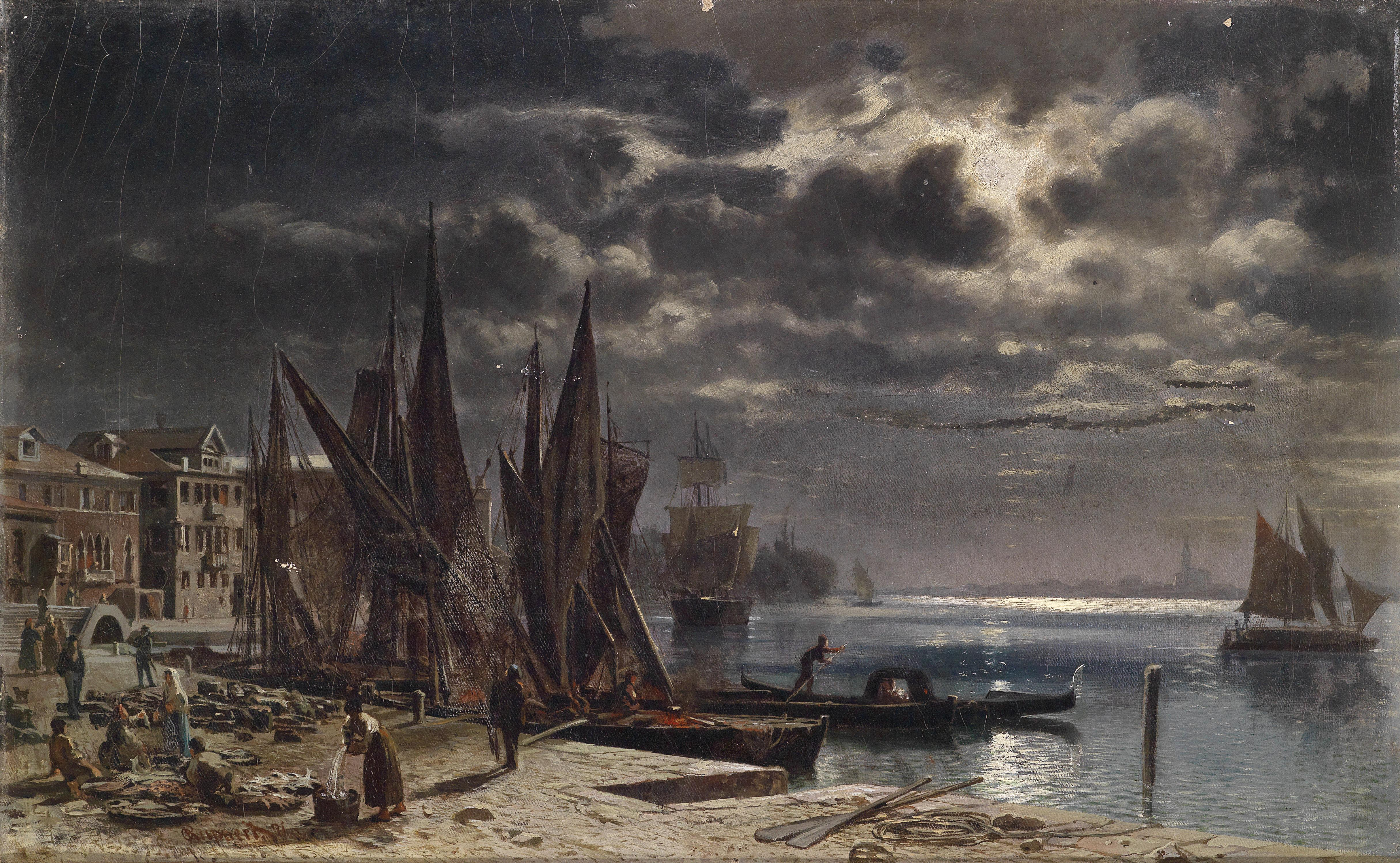 "Mondnacht in Venedig", undeutlich datiert (18)71?, Öl auf Leinwand, 33,5 x 54 cm